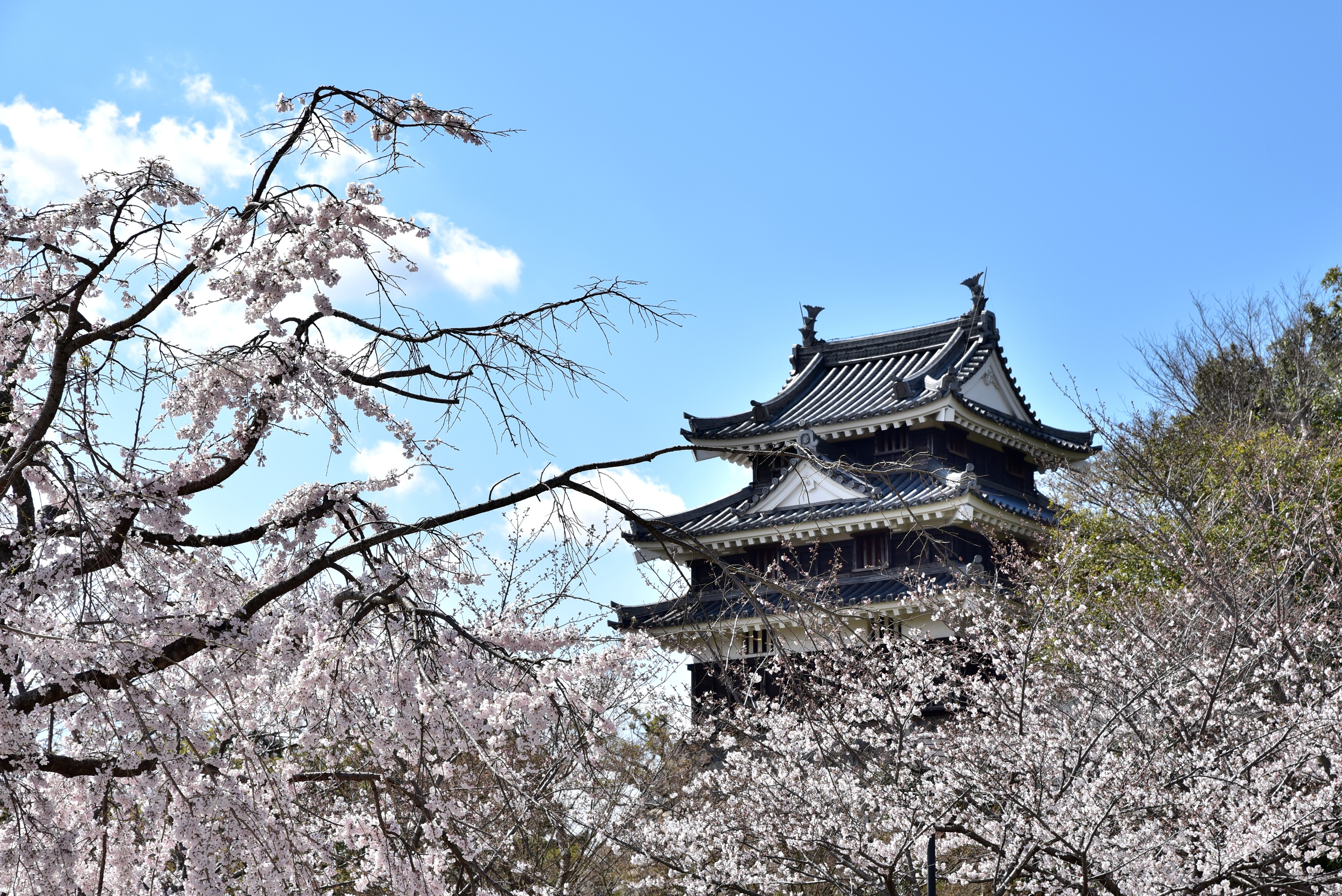 西尾城本丸丑寅櫓 Nikon D750